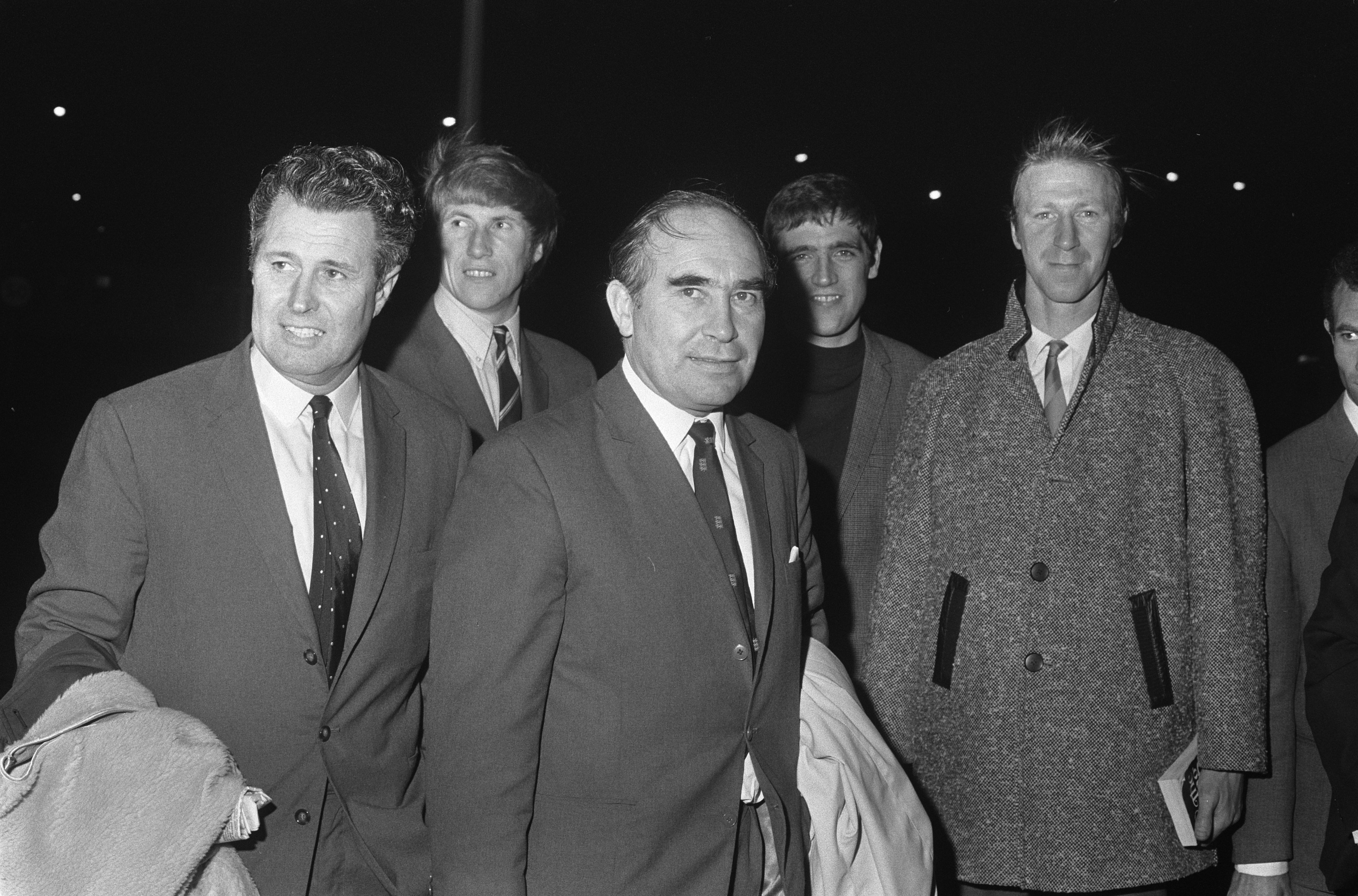 Collectie / Archief : Fotocollectie Anefo Reportage / Serie : [ onbekend ] Beschrijving : Engels voetbalelftal arriveert op Schiphol voor de wedstrijd tegen Nederlands elftal aanstaande woensdag. Nummer 11 Links Burgwal, rechts A. Ramsey / Datum : 3 november 1969 Locatie : Noord-Holland, Schiphol Trefwoorden : sport, voetbal Persoonsnaam : A. Ramsey Fotograaf : Verhoeff, Bert / Anefo Auteursrechthebbende : Nationaal Archief Materiaalsoort : Negatief (zwart/wit) Nummer archiefinventaris : bekijk toegang 2.24.01.05 Bestanddeelnummer : 922-9354